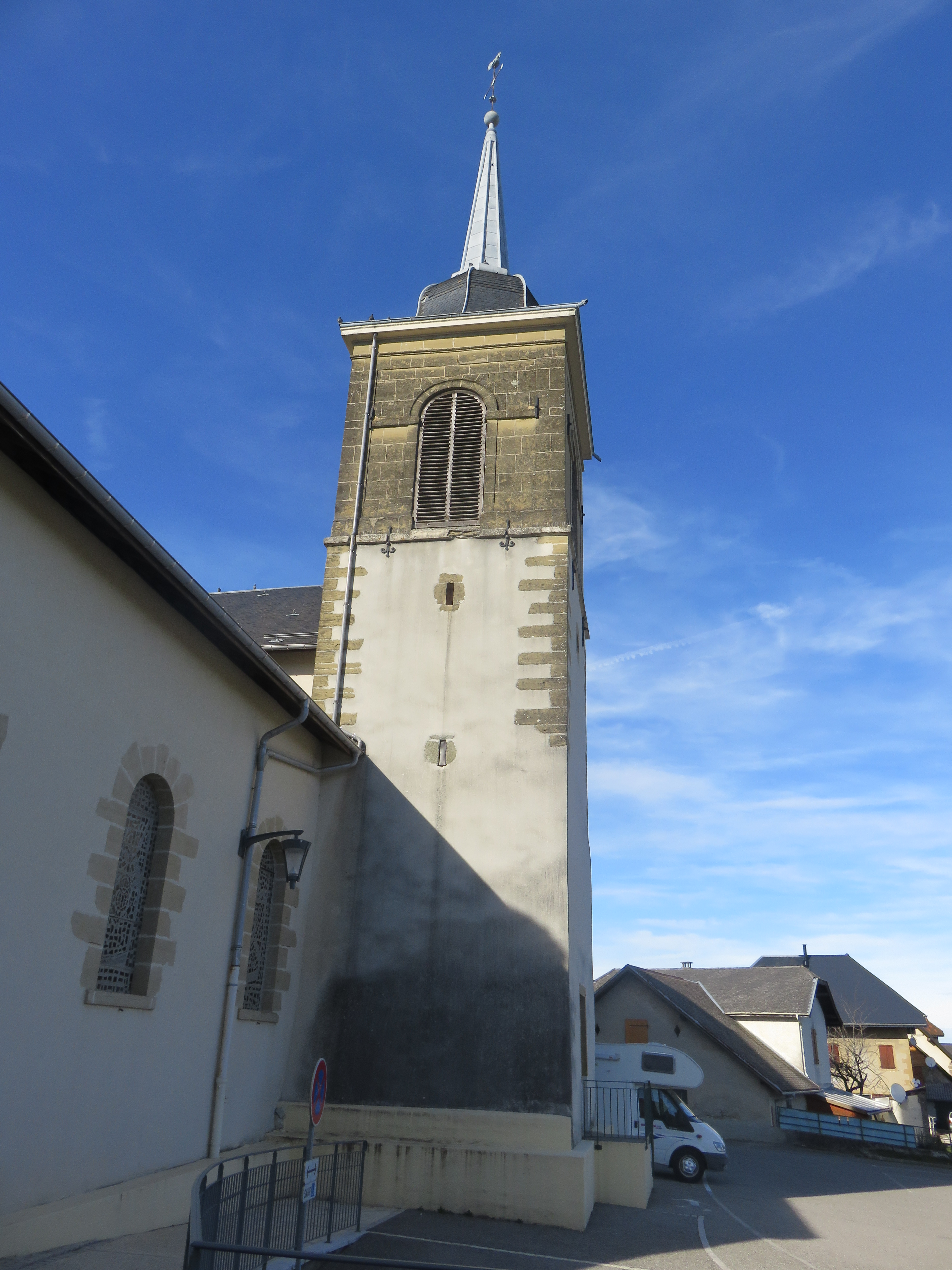 Le clocher de l’église Saint-Maurice (Marcellaz-Albanais, France) le 23 février 2020.